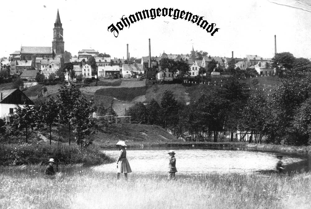 Erläuterungstafel am Standort der Fundgrube „Georg Wagsfort“ in Johanngeorgenstadt.